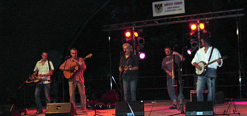 Robert Křesťan a Druhá tráva na koncertě v lesoparku Pintovka v Táboře.